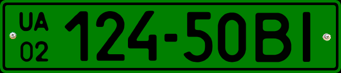 Транзитный номер Украины, 2001-2003 годы